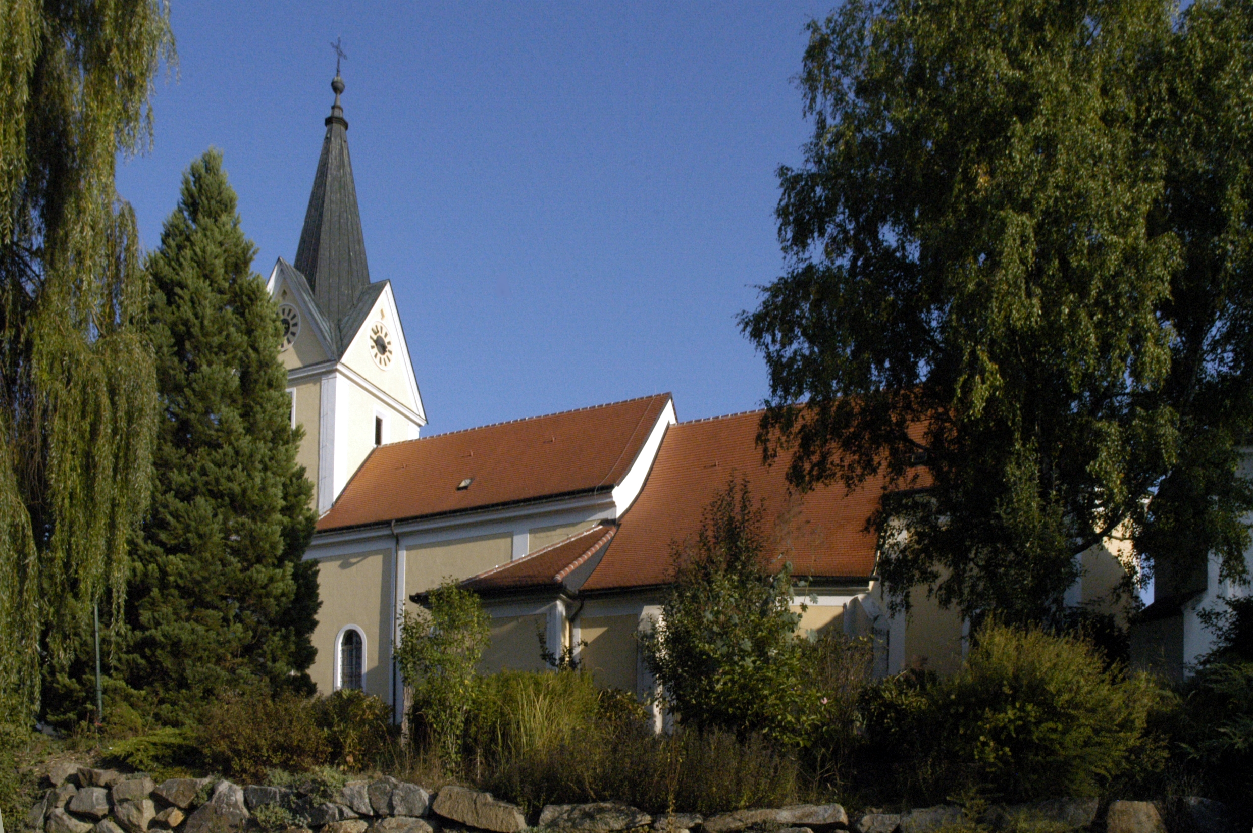 katholische Pfarrkirche heiliger Martin in Mühlbach am Manhartsberg